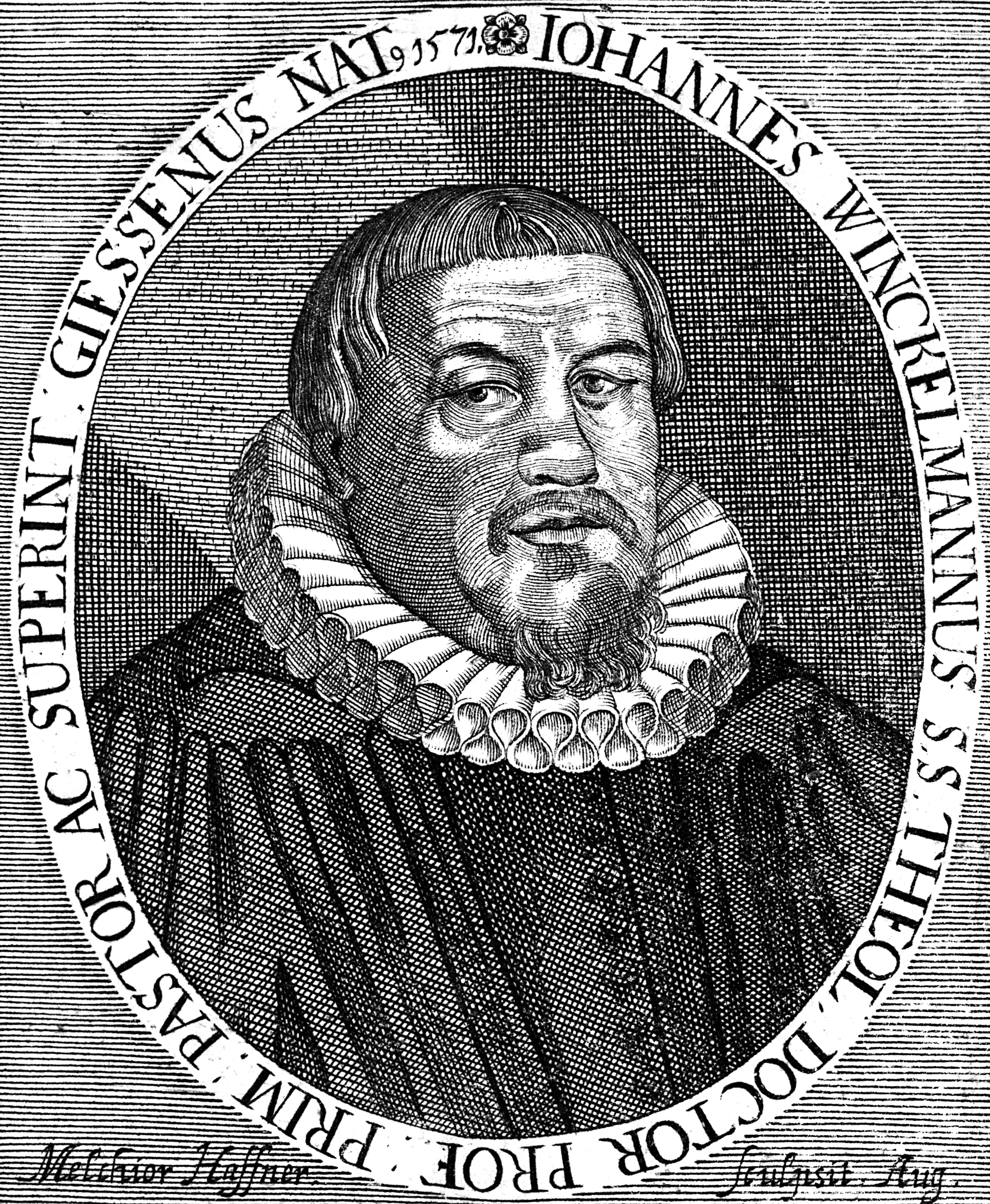 Johannes Winckelmann (1551–1626), deutscher evangelischer Theologe. Kupferstich